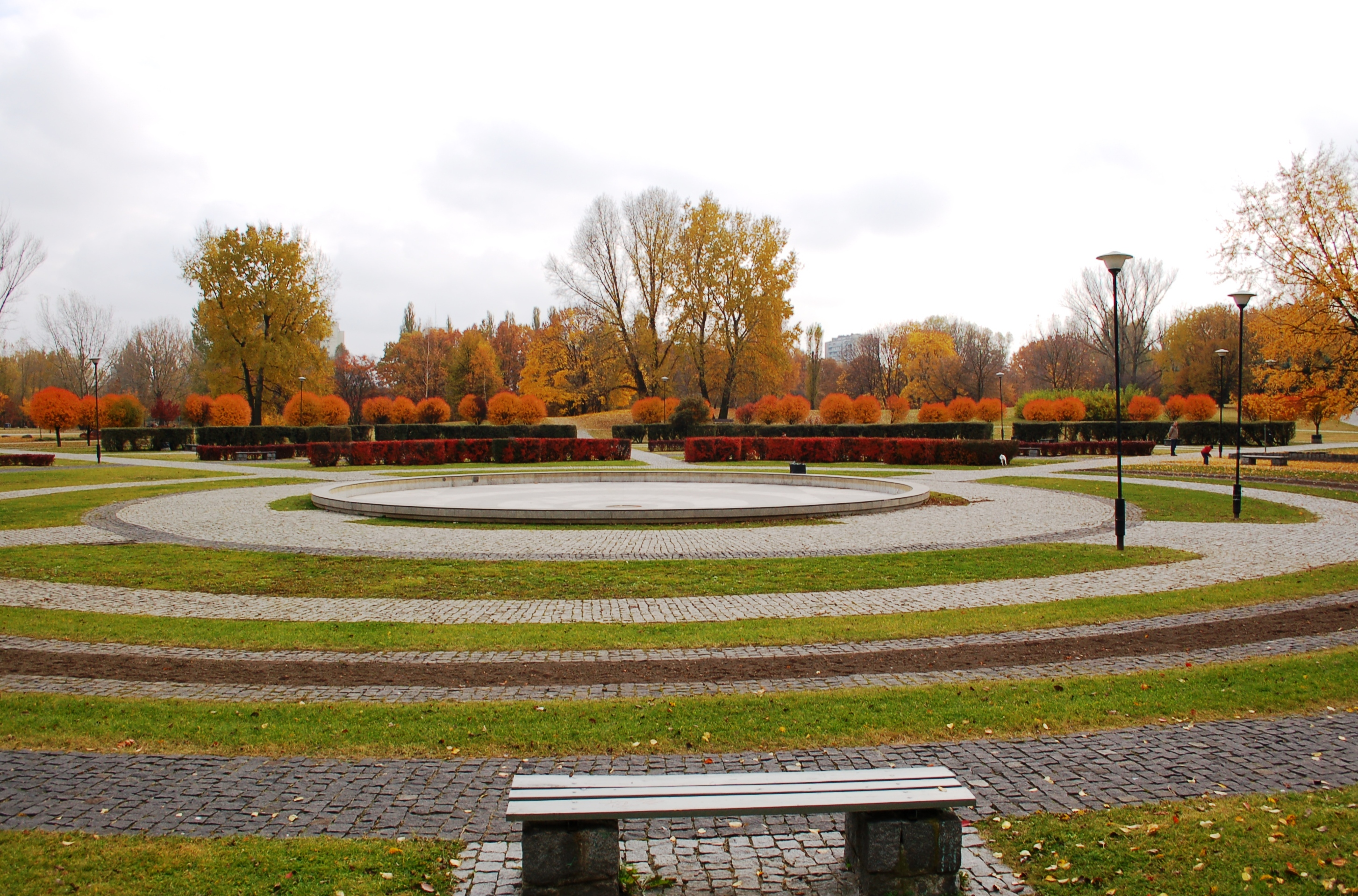 Pole Mokotowskie, Śródmieście-part